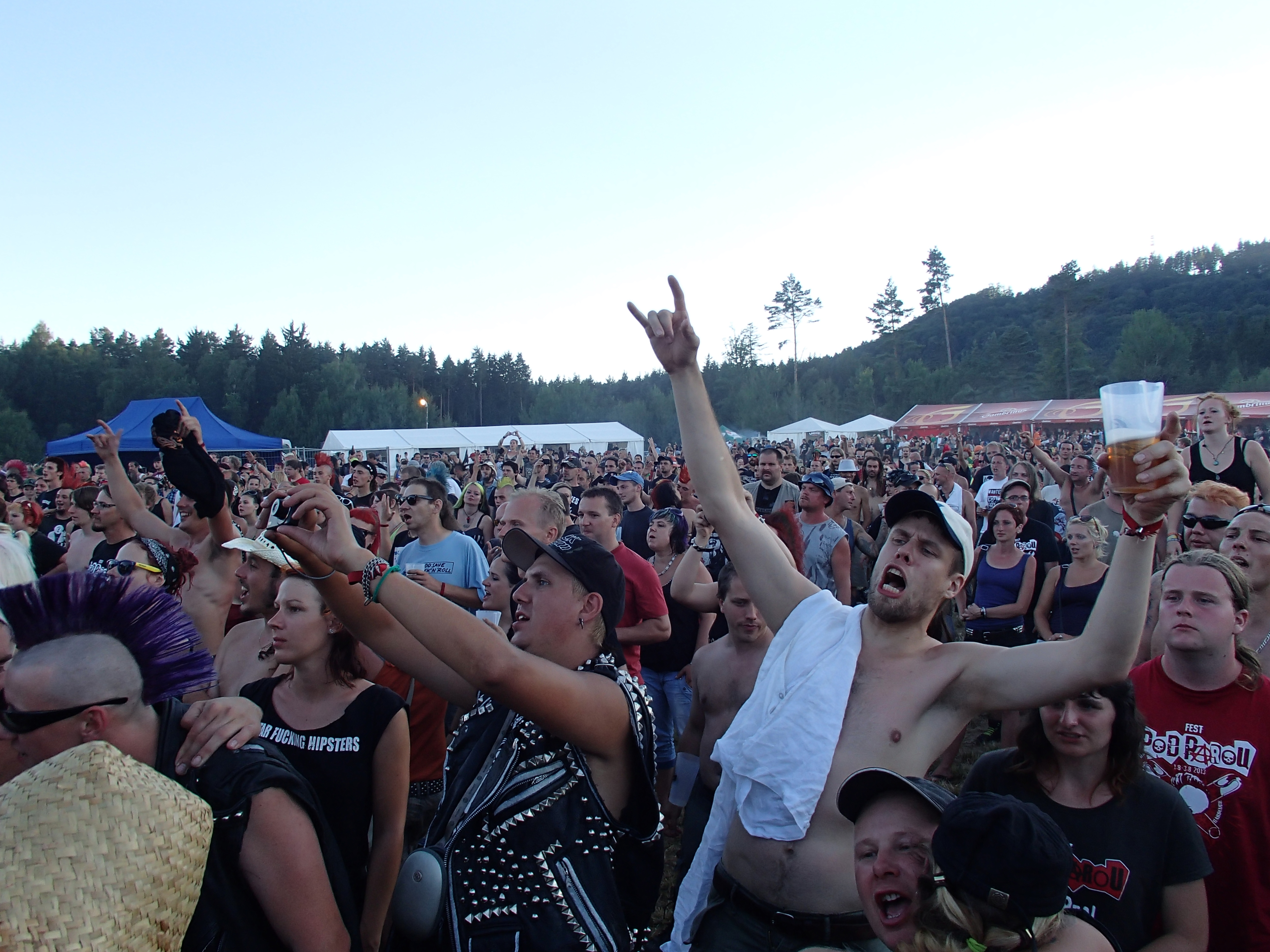 Dav fanoušků na festivalu Pod parou, 1.- 3. 8. 2013 v Moravské Třebové. Crow at Pod parou festival, August 2013,Moravská Třebová, Czech Republic